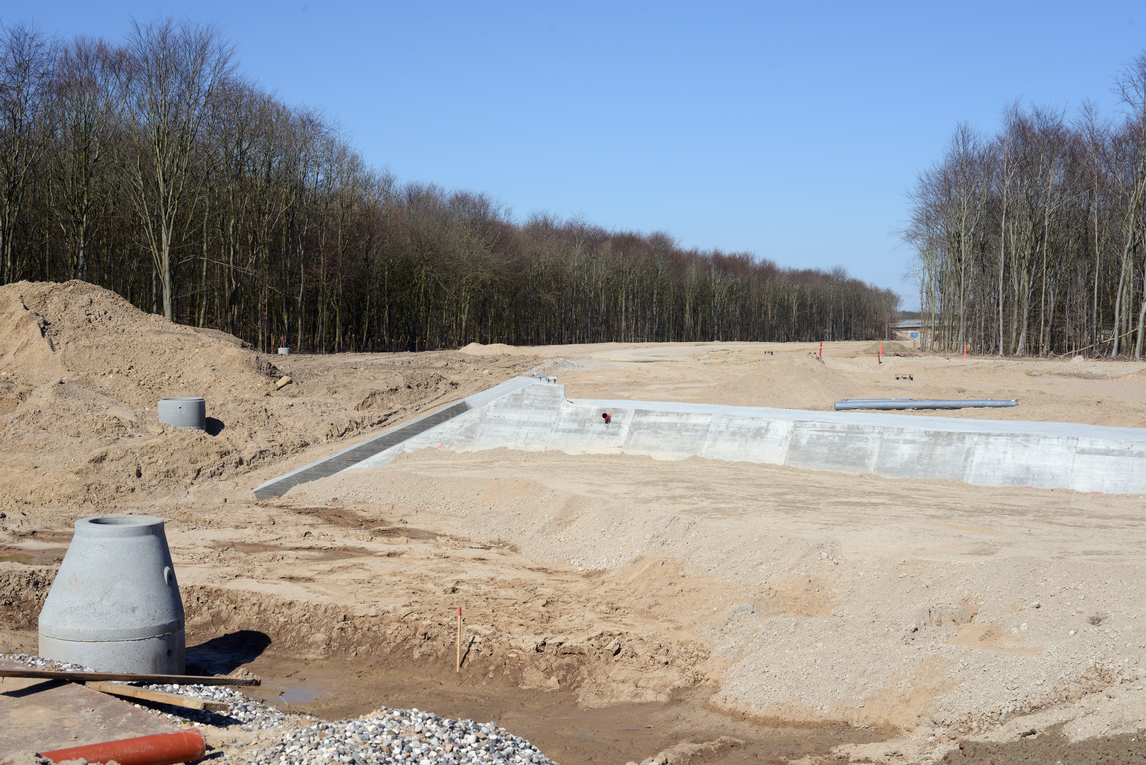 Etablering af den sydlige forlængelse af Munkebjergvej ved Hestehaven set mod nord. I forgrunden tunnel for cykel- og gangsti.